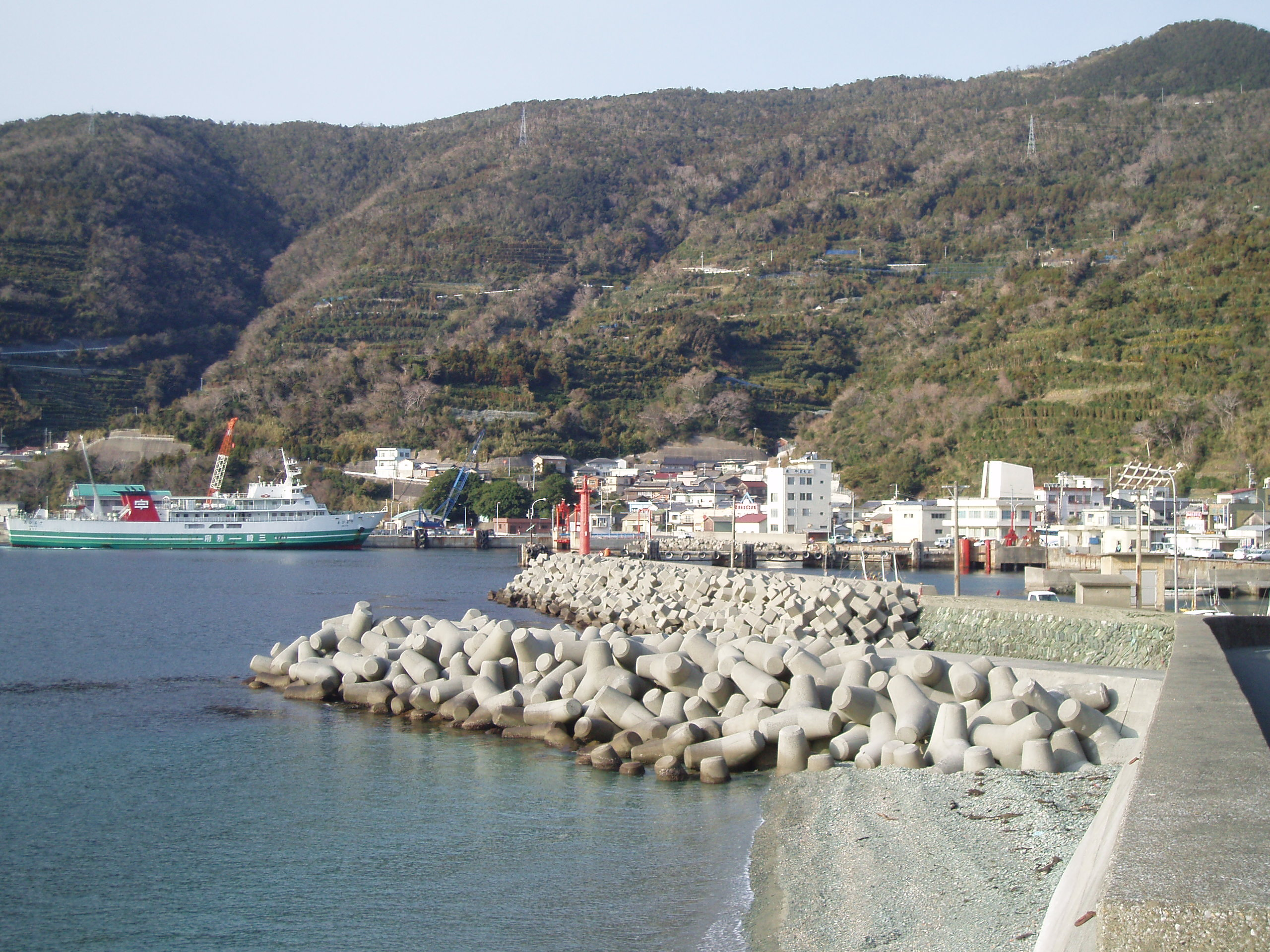 Misaki Port in Wikipedia:Ikata, Ehime